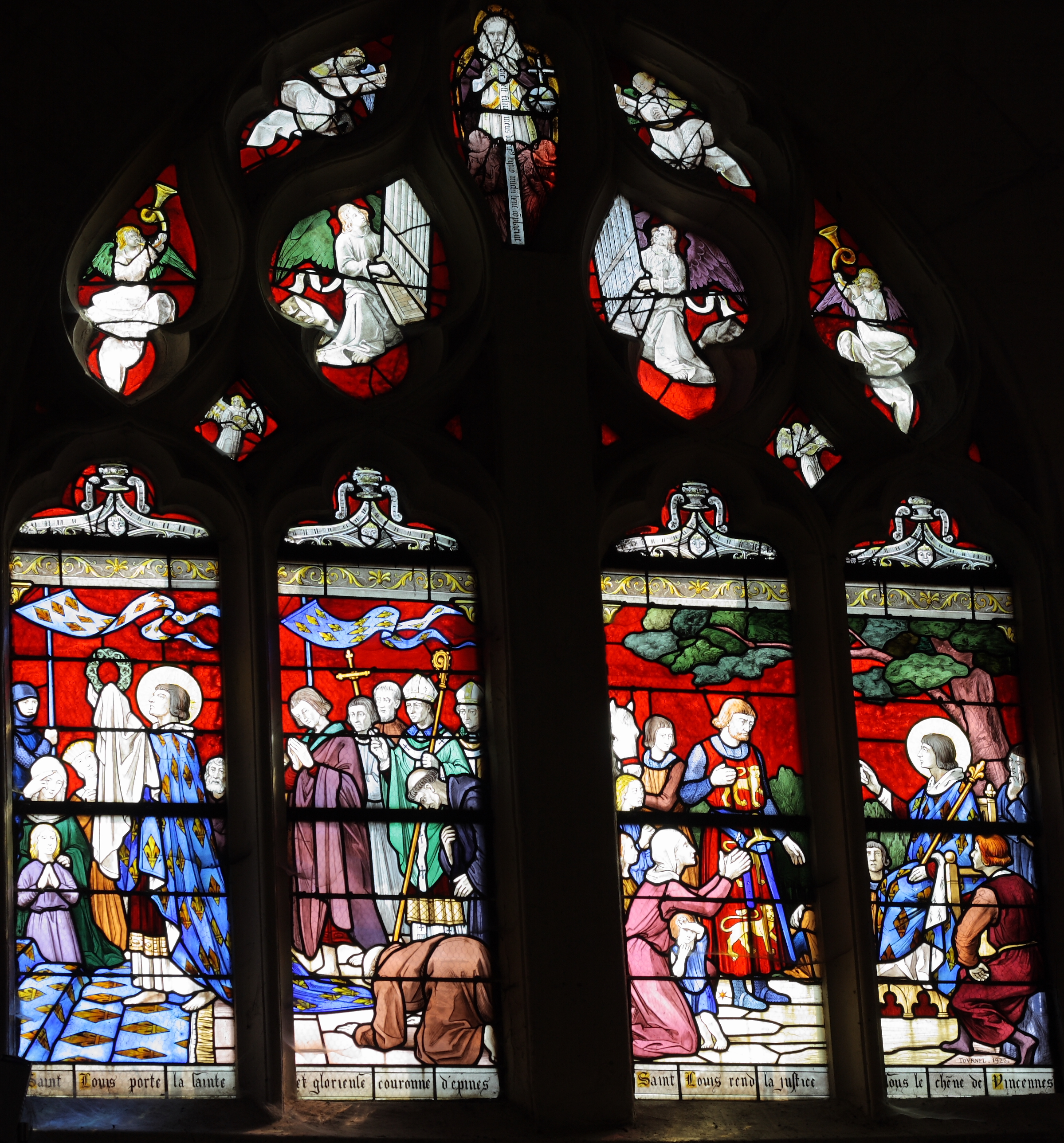 Bleiglasfenster in der katholischen Pfarrkirche Saint-Justin in Louvres, Darstellung: Ludwig der Heilige